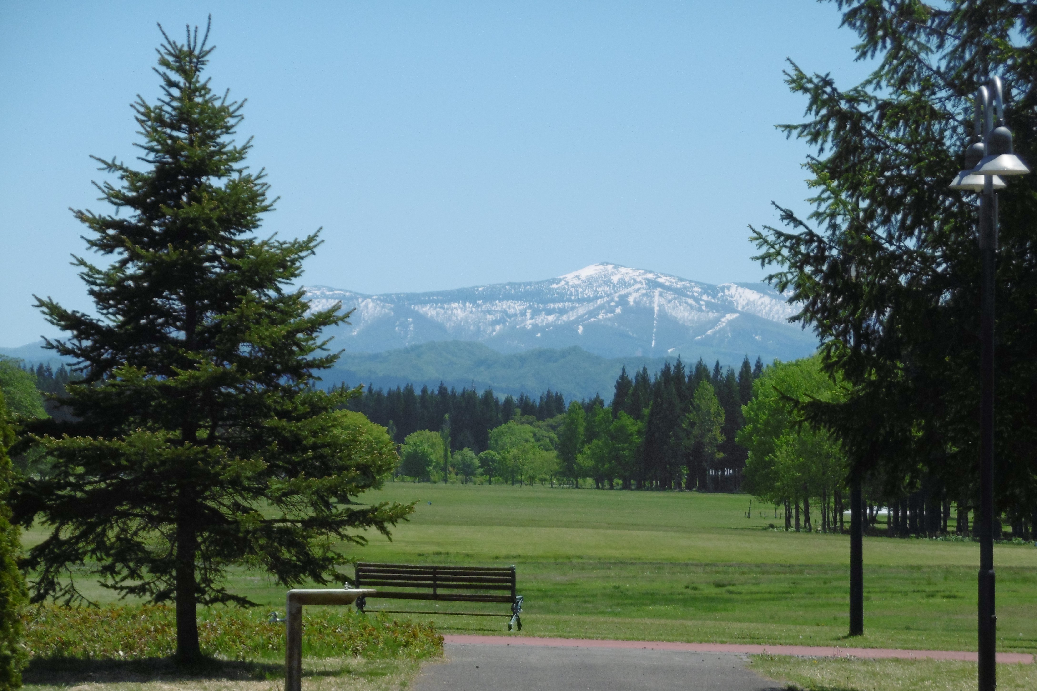 秋田県立北欧の杜公園： 森吉山を望む